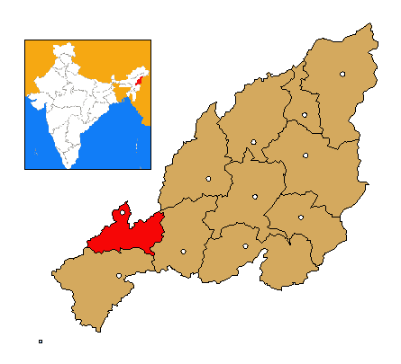 Mapa de localización distrito de Dimapur , estado de Nagaland en la India